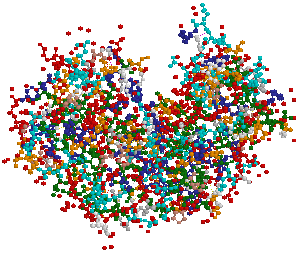 Molécule de chymosine colorée selon ses acides aminés